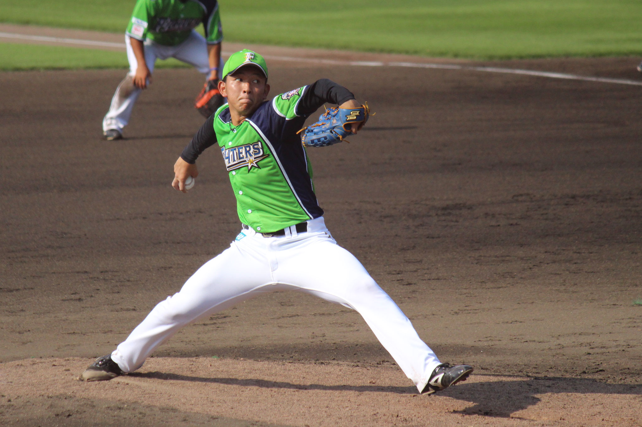 北海道日本ハムファイターズ #37 柿木蓮 ファイターズ鎌ヶ谷スタジアムにて